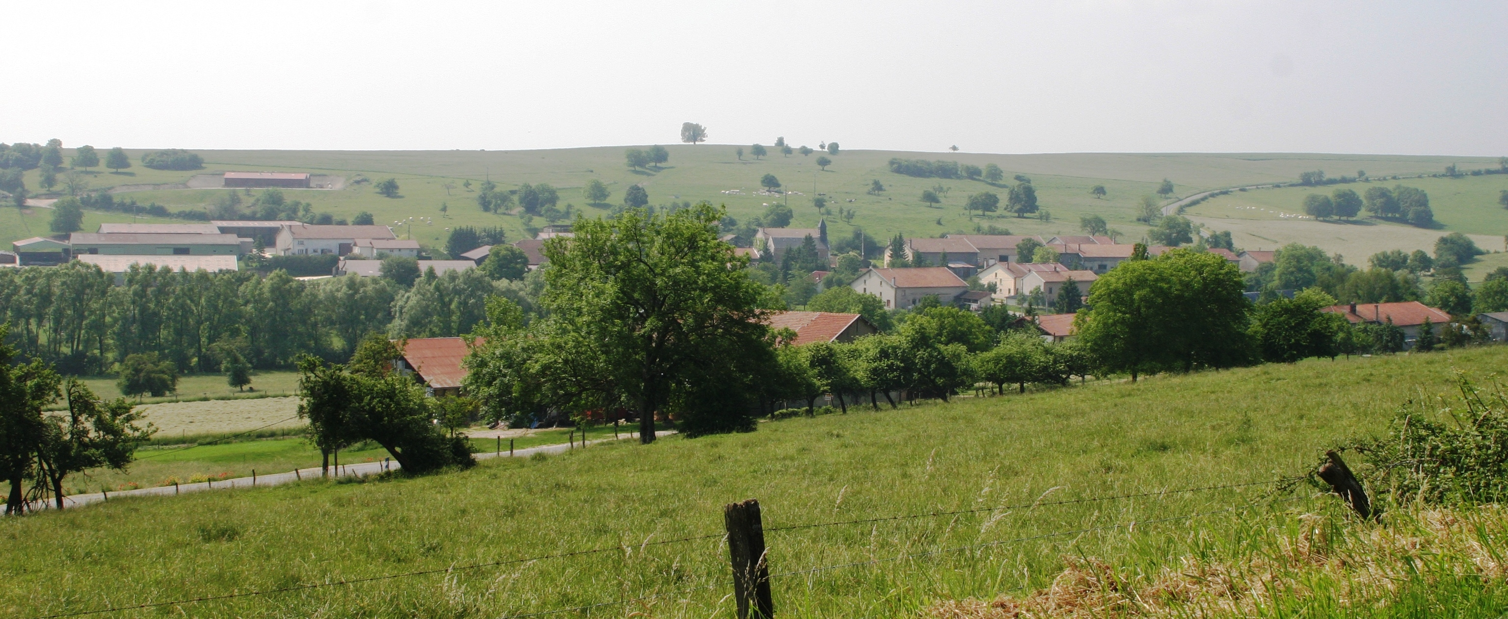 Vue iwwer Cuisy.